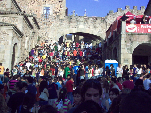 Womad2